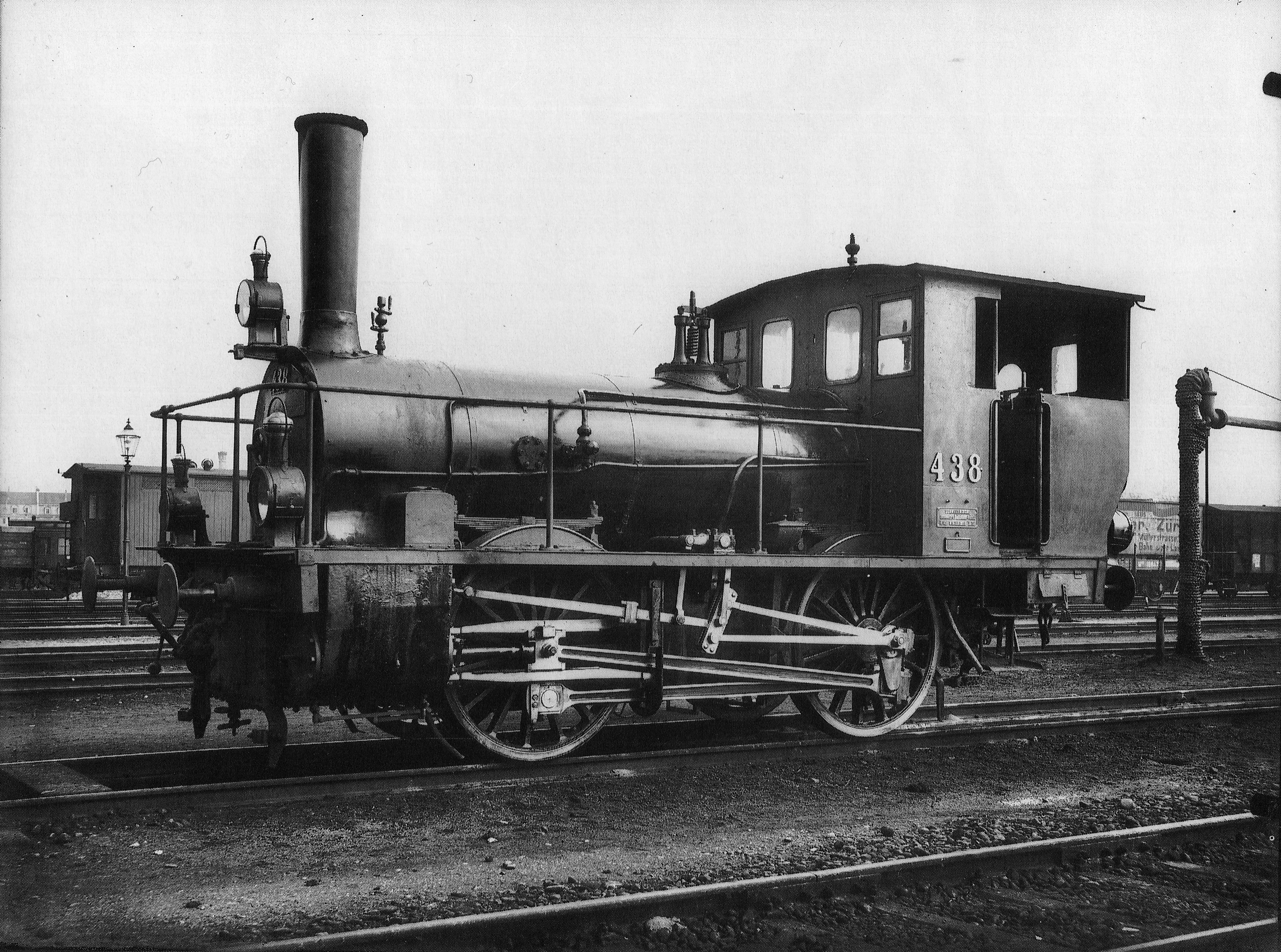 Tender-Locomotive Nr. 438 (bis 1879 Nr. 185, dann bis 1895 Nr. 238) des Typs E2 der Schweizeriſchen Nordoſtbahn im Bahnhofe von Zürich, gebaut 1876 inn der Schweizeriſchen Locomotiv- und Machines-Fabrique zů Winterthur (Fabr.-Nr. 95), 1895 mit neuem Keſſel ausgeſtattet, 1902 von den Schweizeriſchen Bundesbahnen als E 2/2 Nr. 8093 übernommen, 1916 entweder an die k. u. k. Heeresverwaltung oder nach Frankreich verkauft, Abbruchjahr unbekannt; aufgnommen um 1902.